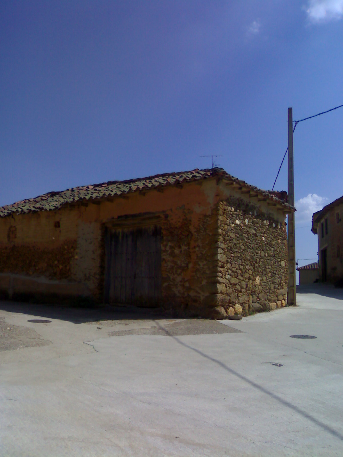 Imagen de una construcción típica, en el pueblo de La Milla de Tera